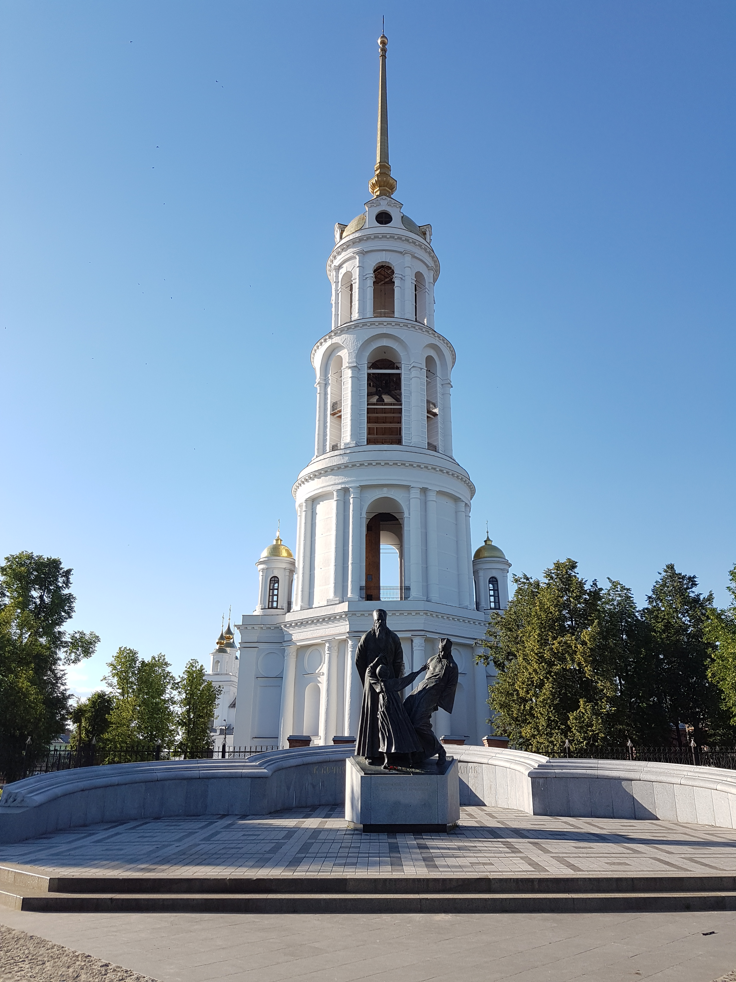 Воскресенский собор: площадь Зелёная, 4, Шуя, Ивановская область